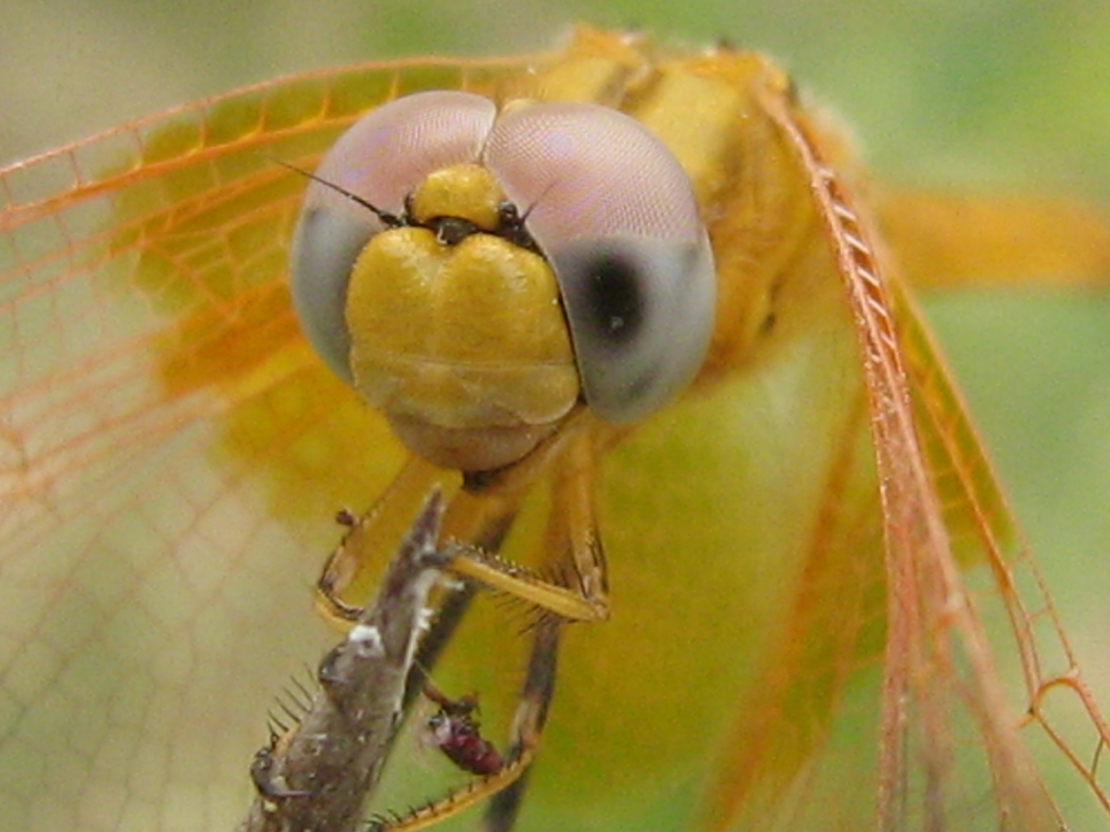 Фасеточные глаза стрекозы